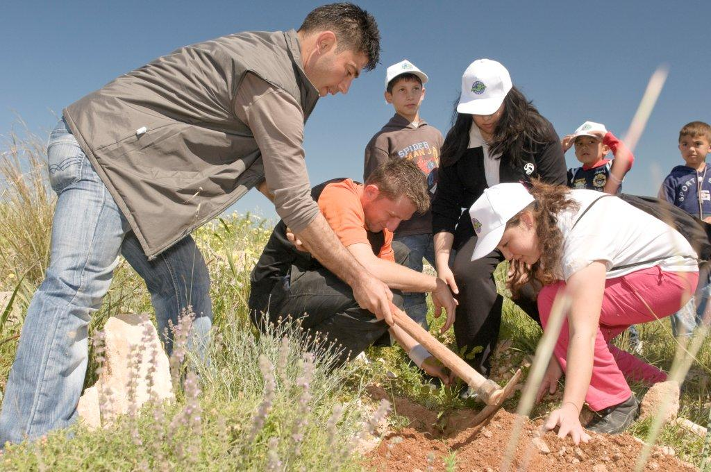 Fidan Dikimi